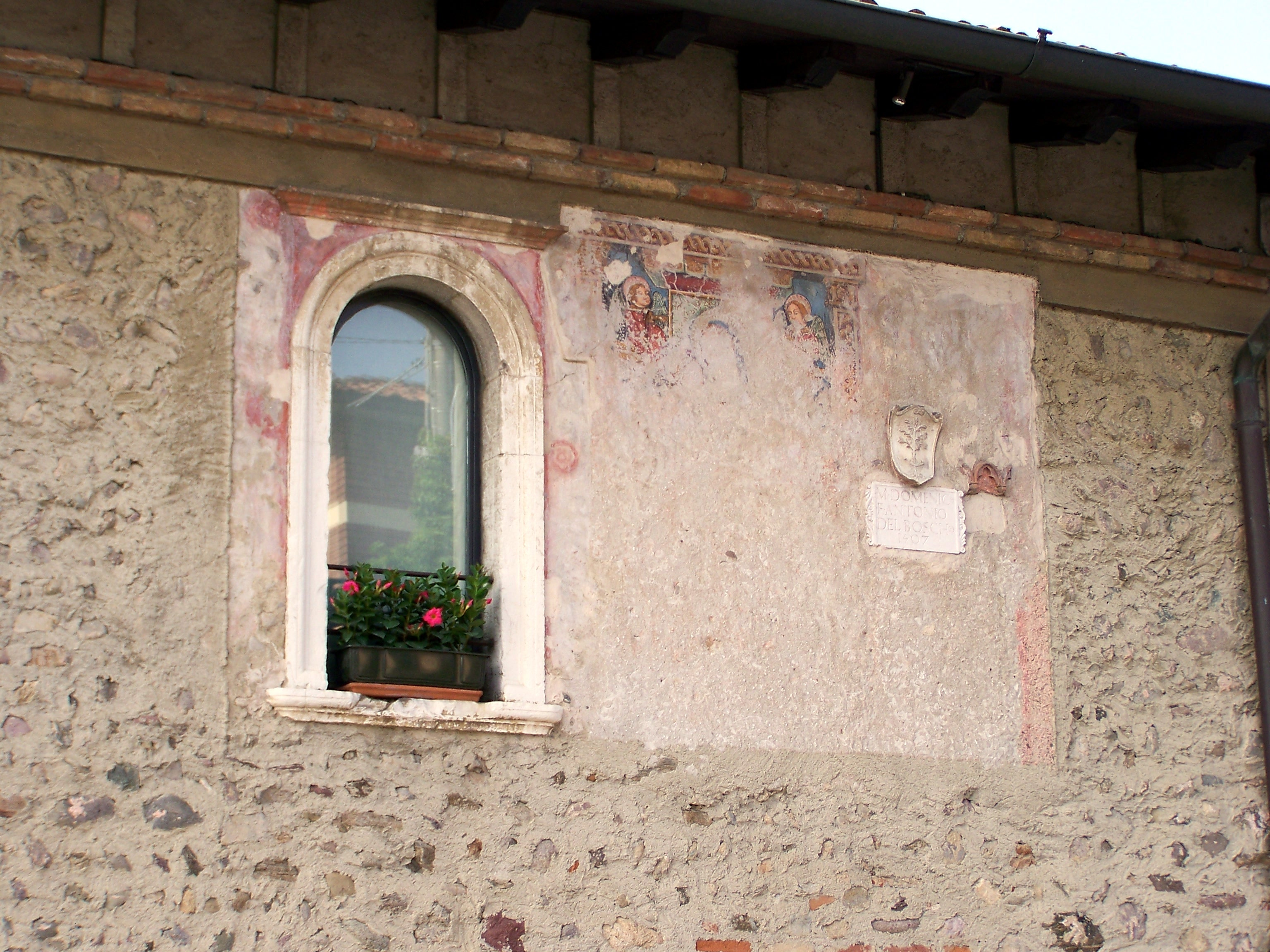 Resti del castello di Cazzago: finestra, intonaco ed iscrizione marmorea del XV secolo su un muro di una casa di via IV novembre a Cazzago San Martino.